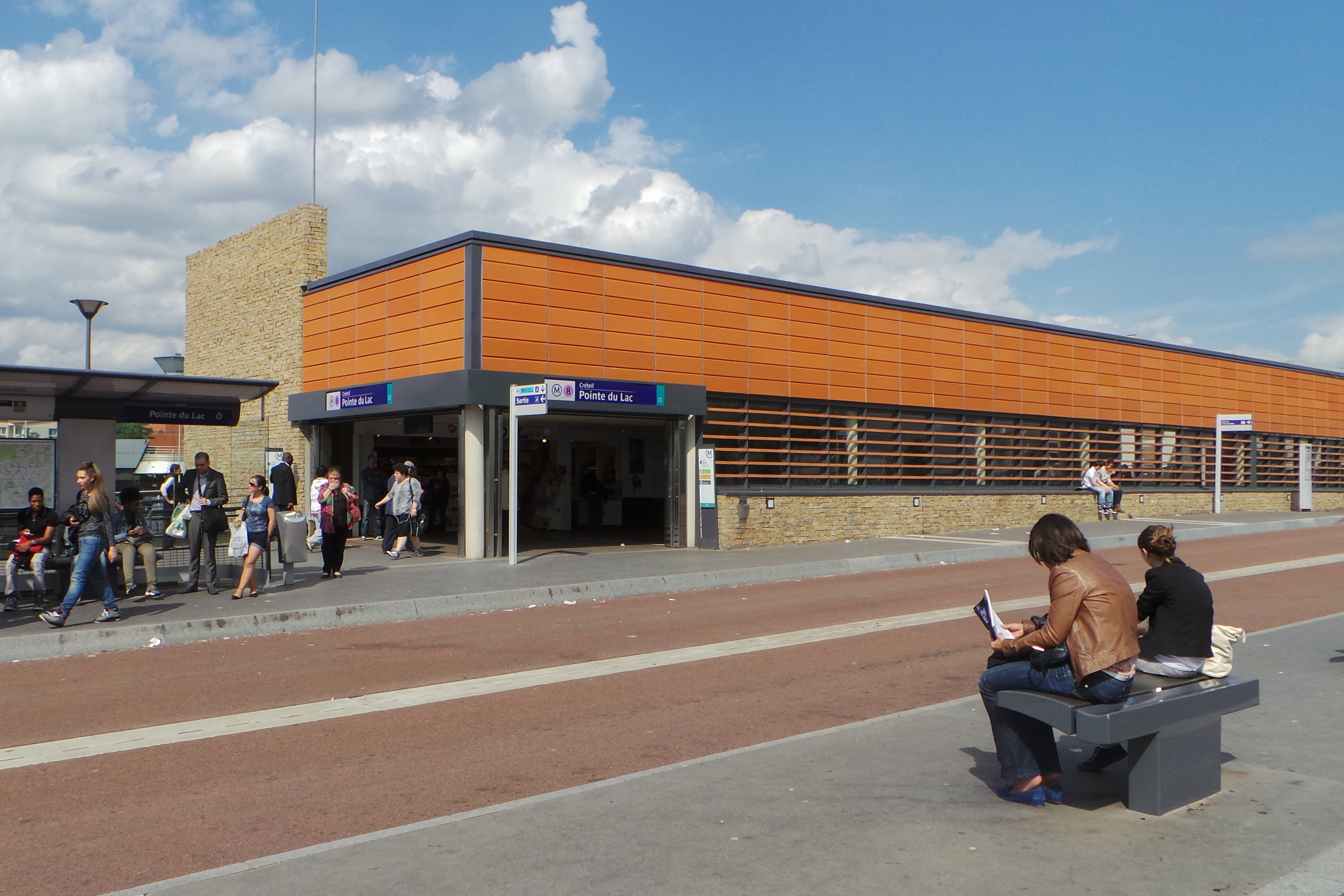 Station de métro Pointe du Lac, métro de Paris ligne 8, Créteil, France